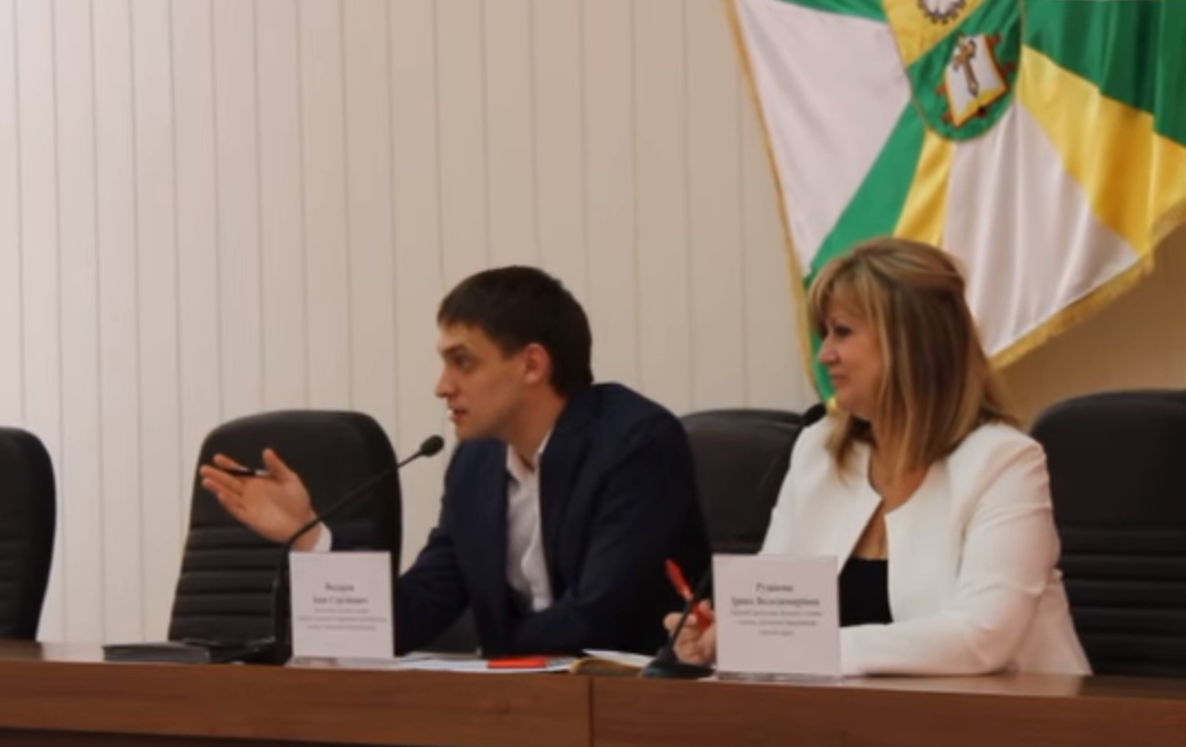 депутат